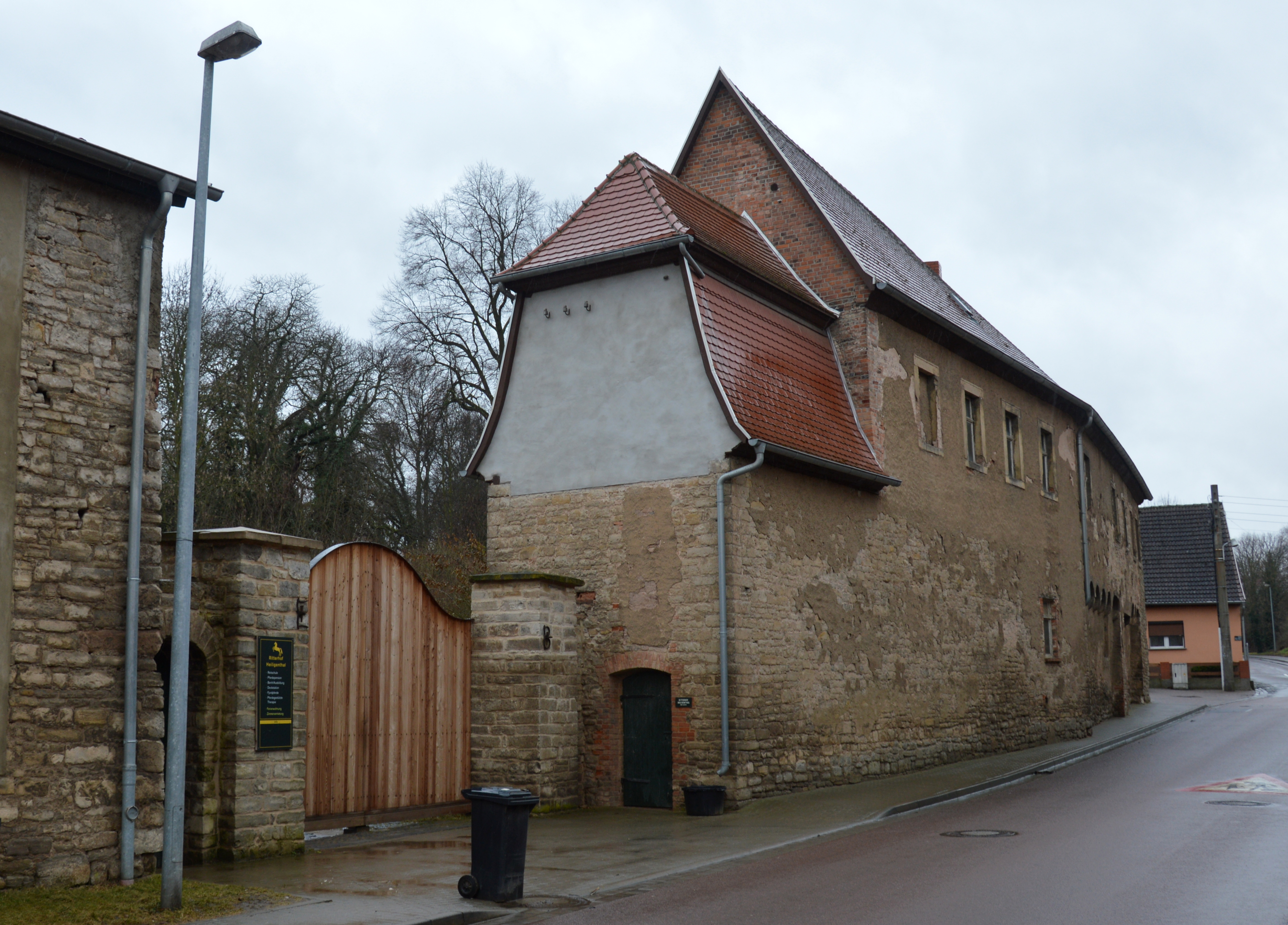 Rittergut in Heiligenthal